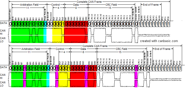 Aufbau eines CAN-Daten-Frames mit elektrischen Pegeln und eingefügten Stuffbits